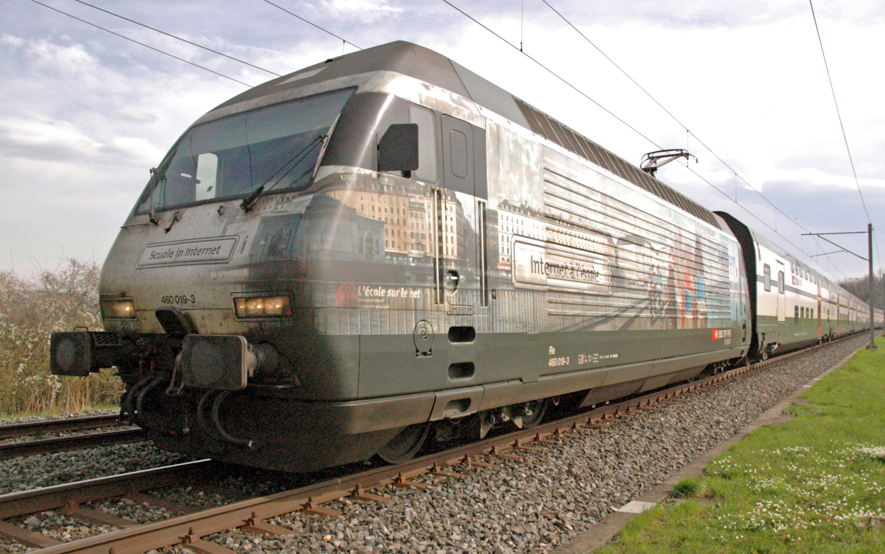 SBB Re 460 Werbelokomotive "Schulen ans Netz" mit IC-2000 Doppelstockwagen zwischen Schwarzenbach und Algetshausen-Henau